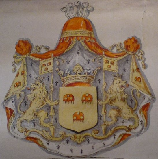 Armoiries de la famille de Maillen.